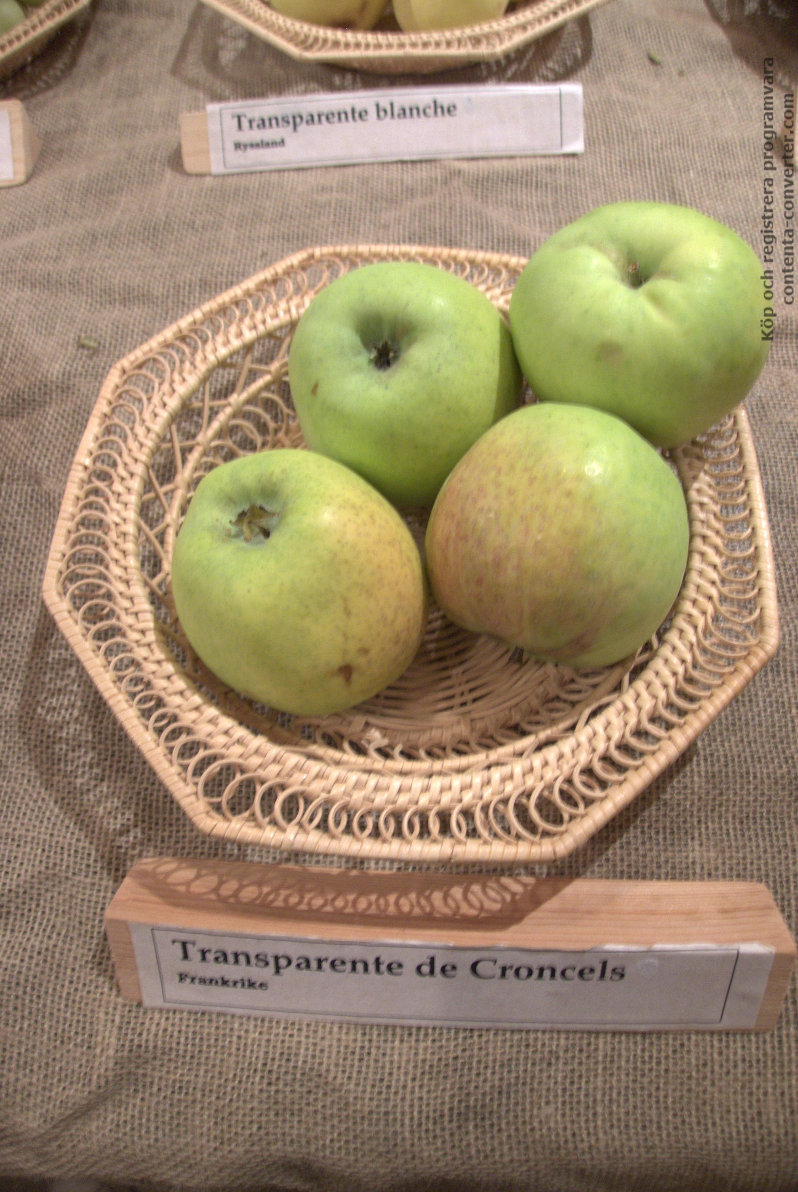 Äpplen av sorten Transparente de Croncels